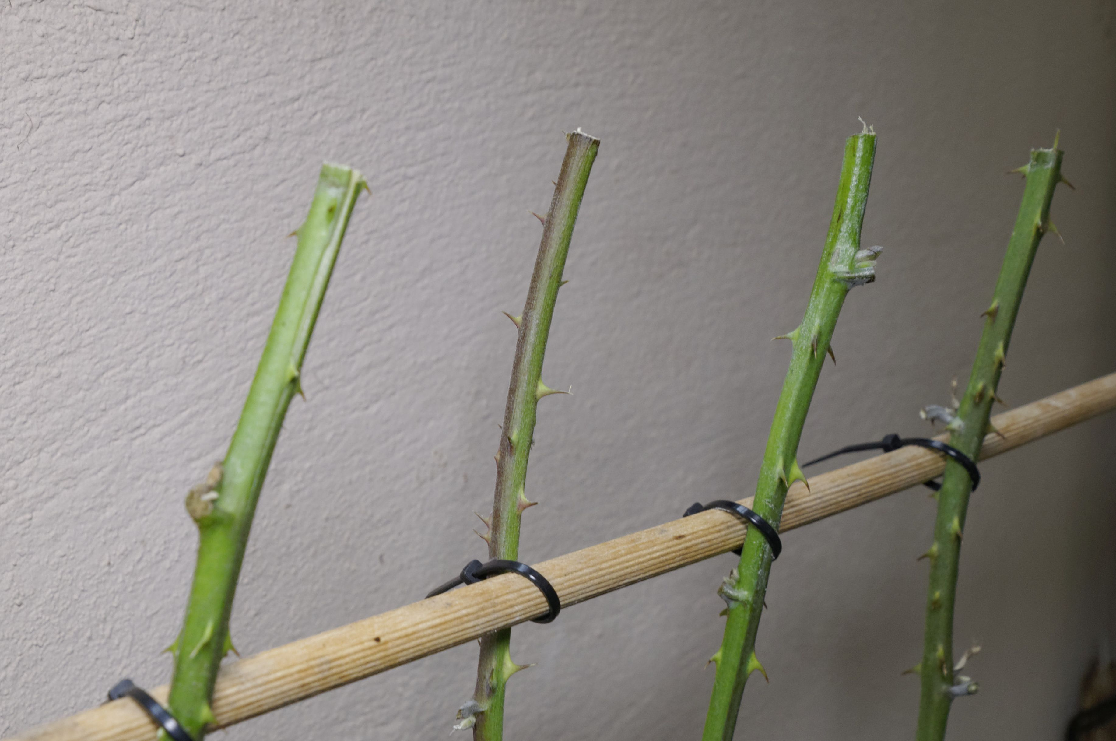 Nisthilfe markhaltige Pflanzenstängel